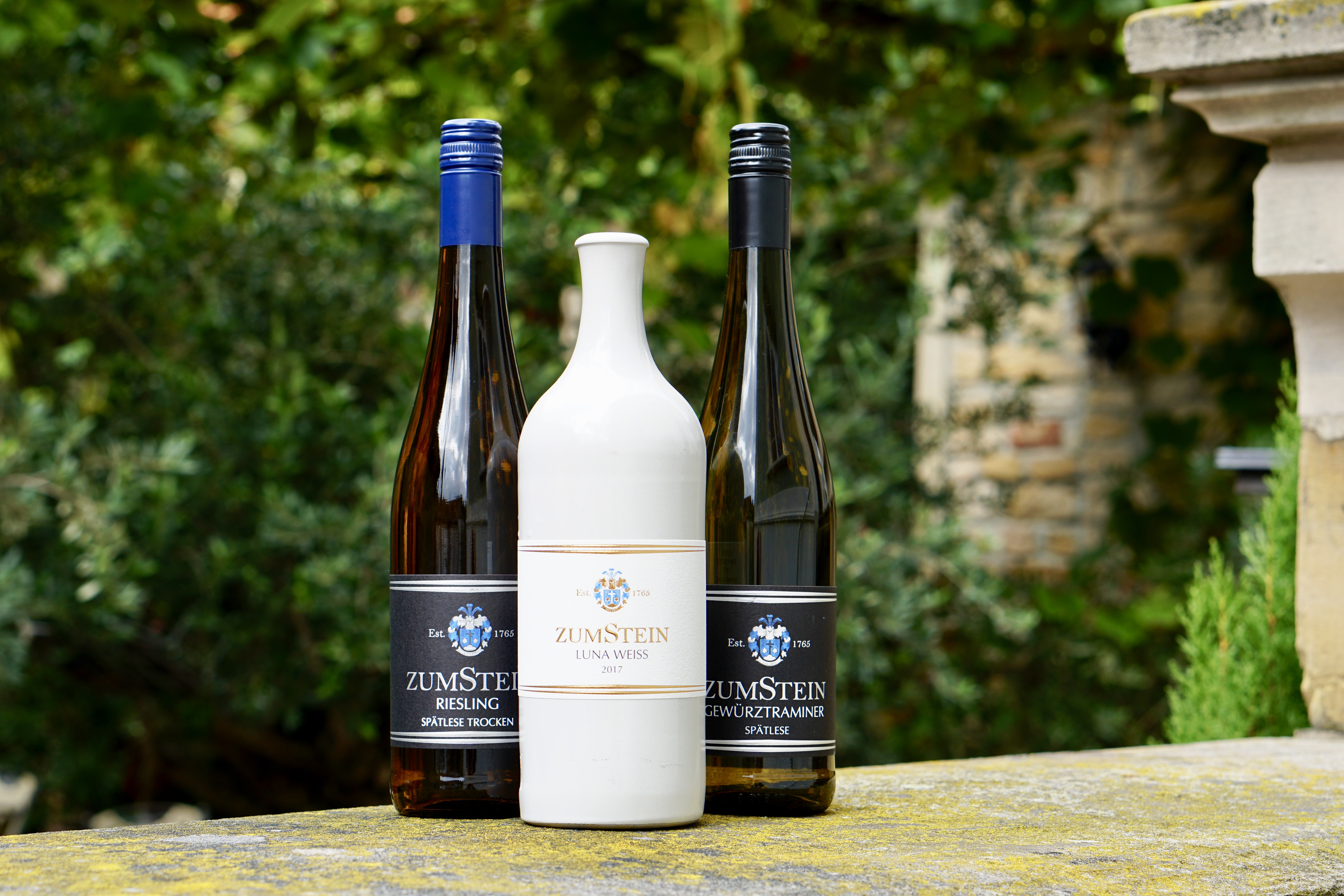 Weine